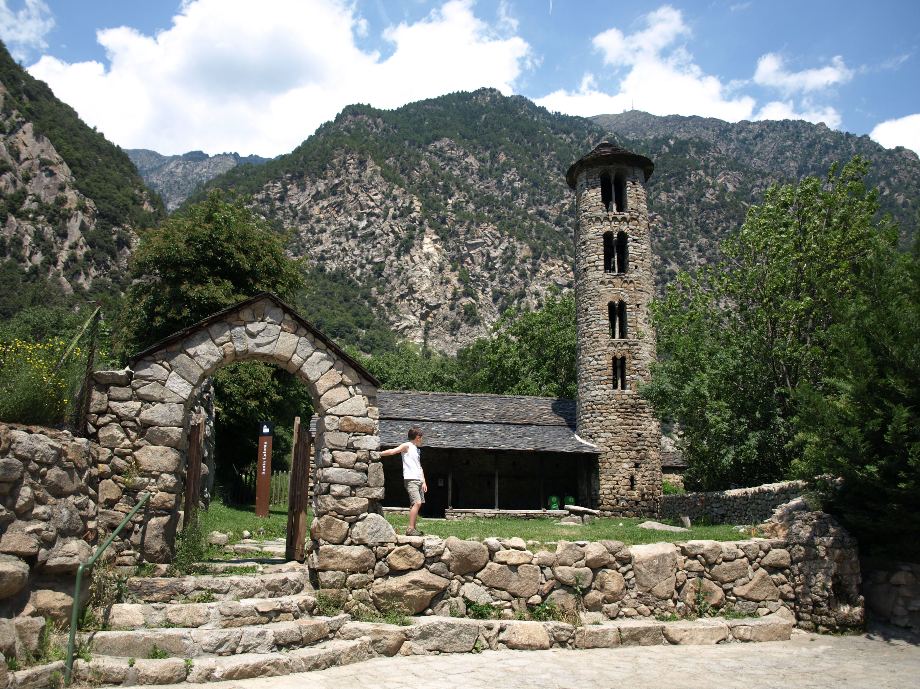 Església de Santa Coloma